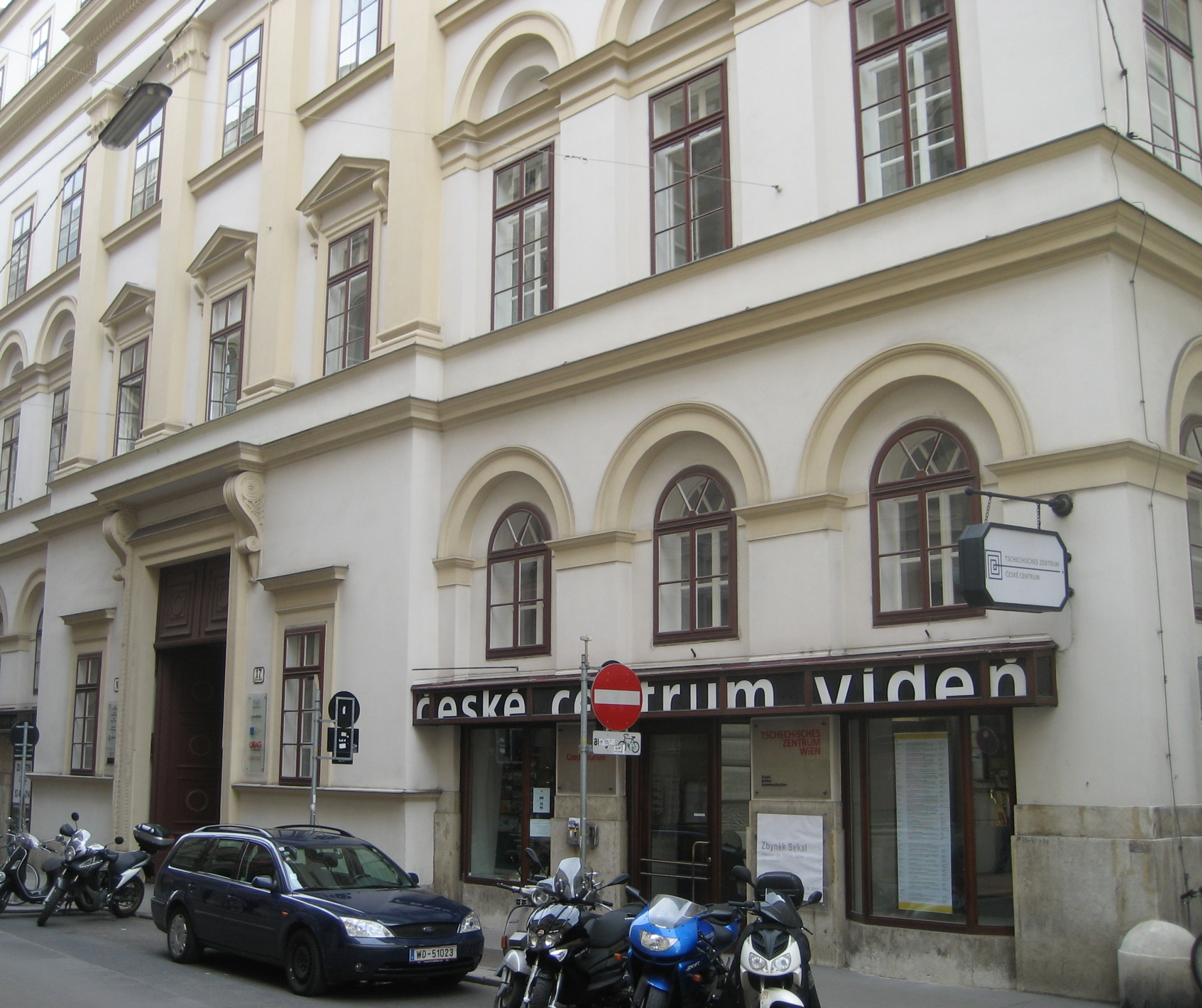 das Haus Herrengasse 17 im 1. Bezirk, in Wien